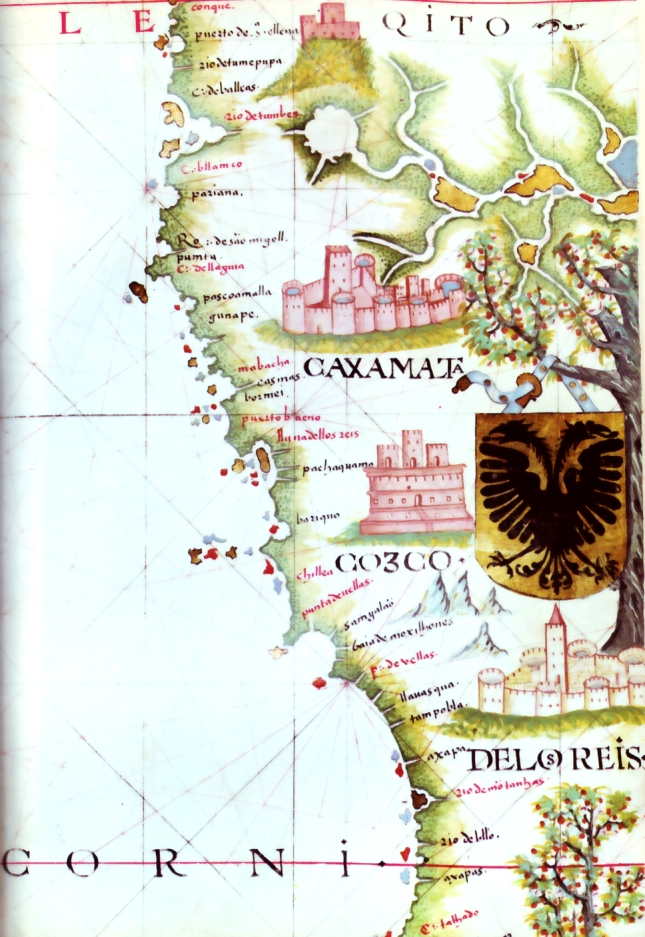 Hoja del Atlas de Fernando Vaz Dourado, representando la costa marítima del Perú y las ciudades de Cajamarca, Cuzco y Los Reyes (Lima), amuralladas según estilo gótico. Año 1568